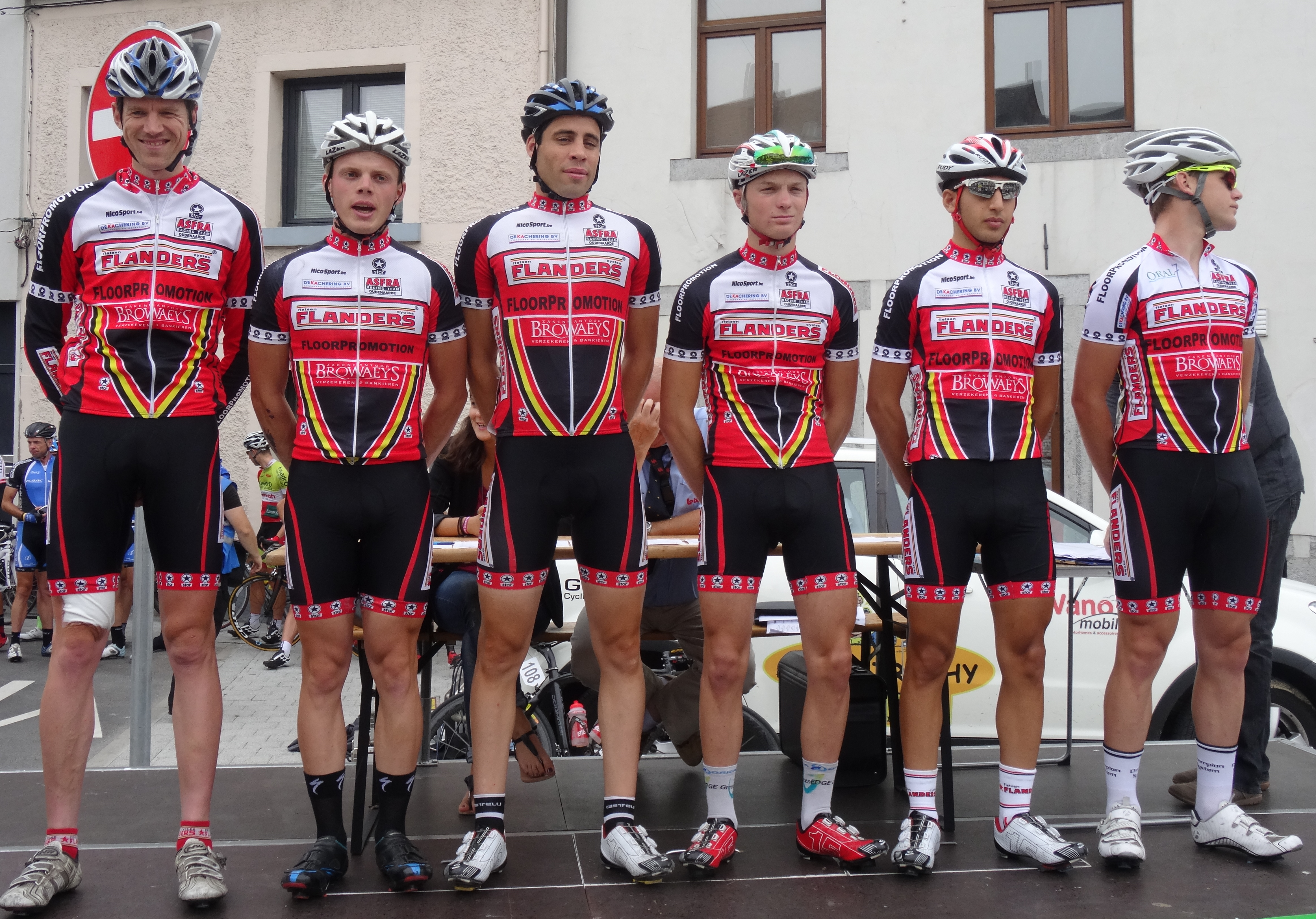 Reportage photographique réalisé le mercredi 6 août à l'occasion du départ de la première étape du Tour de la province de Namur 2014 à Jambes (Namur), Belgique.